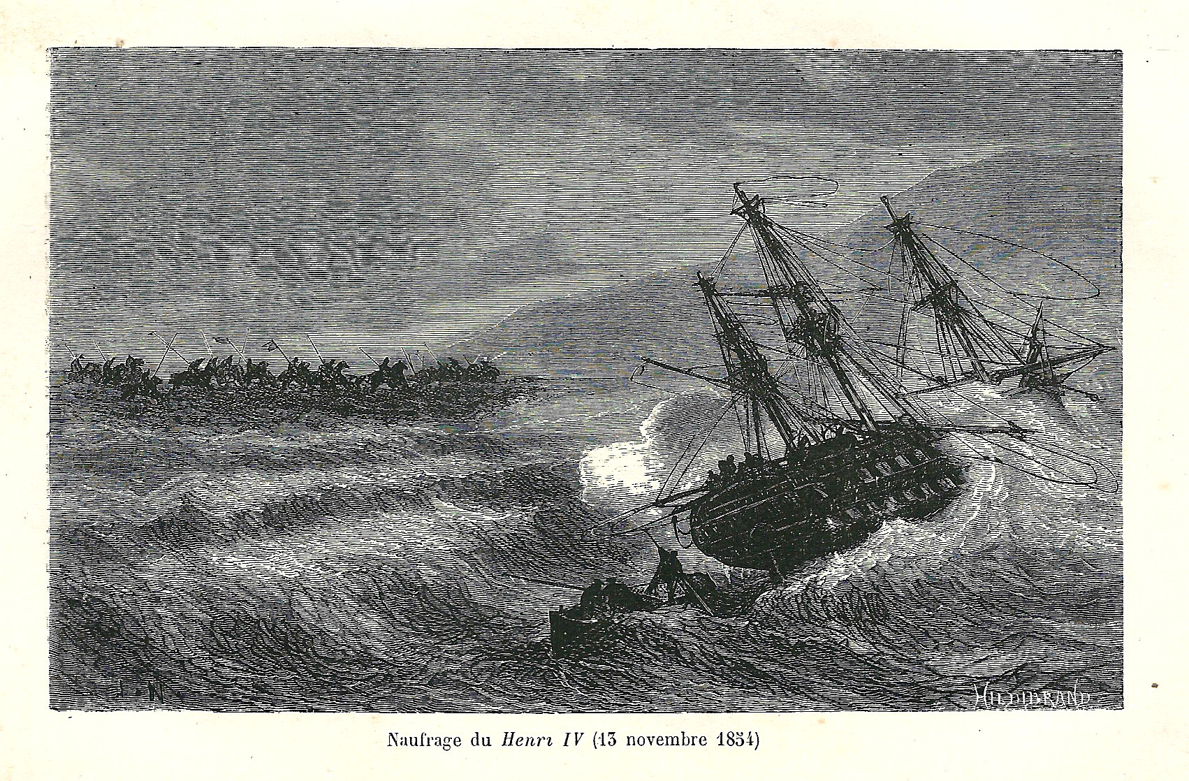 Gravure de Jules Noël tirée de : Zurcher & Margollé, Les Naufrages célèbres, Paris : Hachette, 3e édition, 1877 -- Naufrage du vaisseau le Henri IV, sur la rade d'Eupatoria, le 13 novembre 1854.